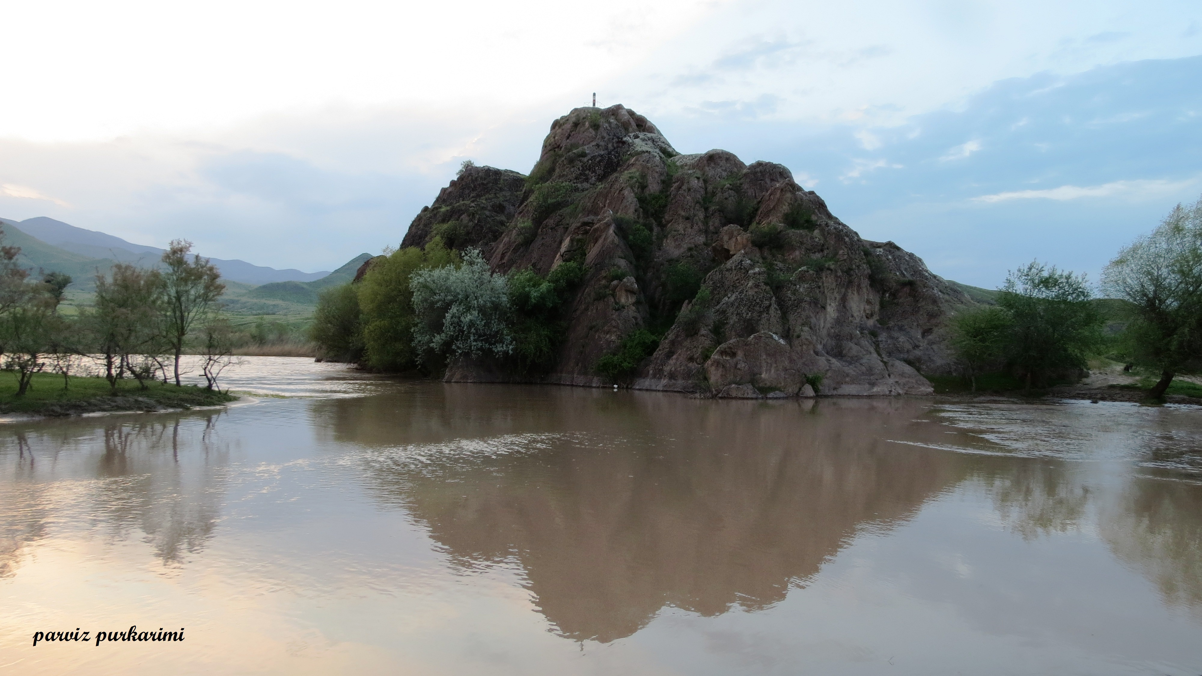 قلعه تاریخی در ساحل جنوبی رود ارس و 500 متری شمال شهر عاشقلو